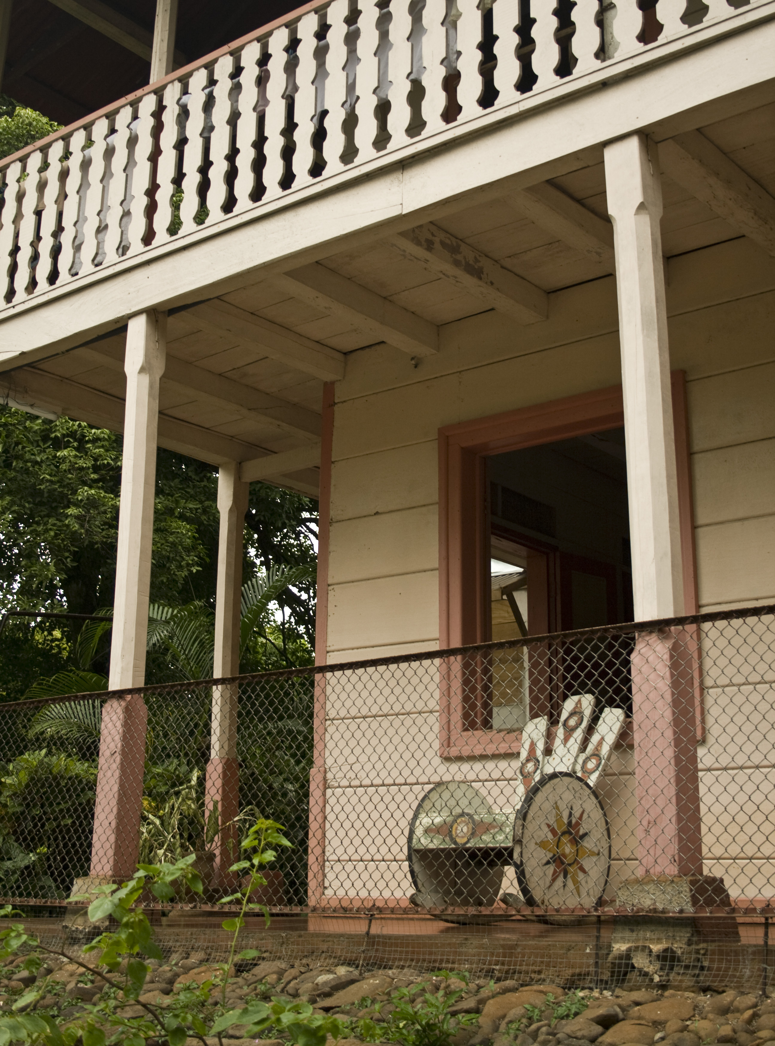 Corredor en una vivienda de San Isidro. Cantón de Montes de Oro. Puntarenas, Costa Rica.